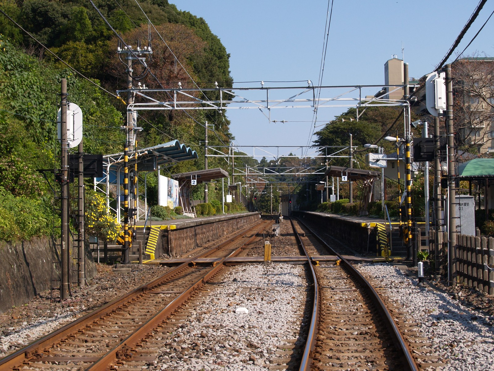 富戸駅ホーム（隣接する踏切より撮影）